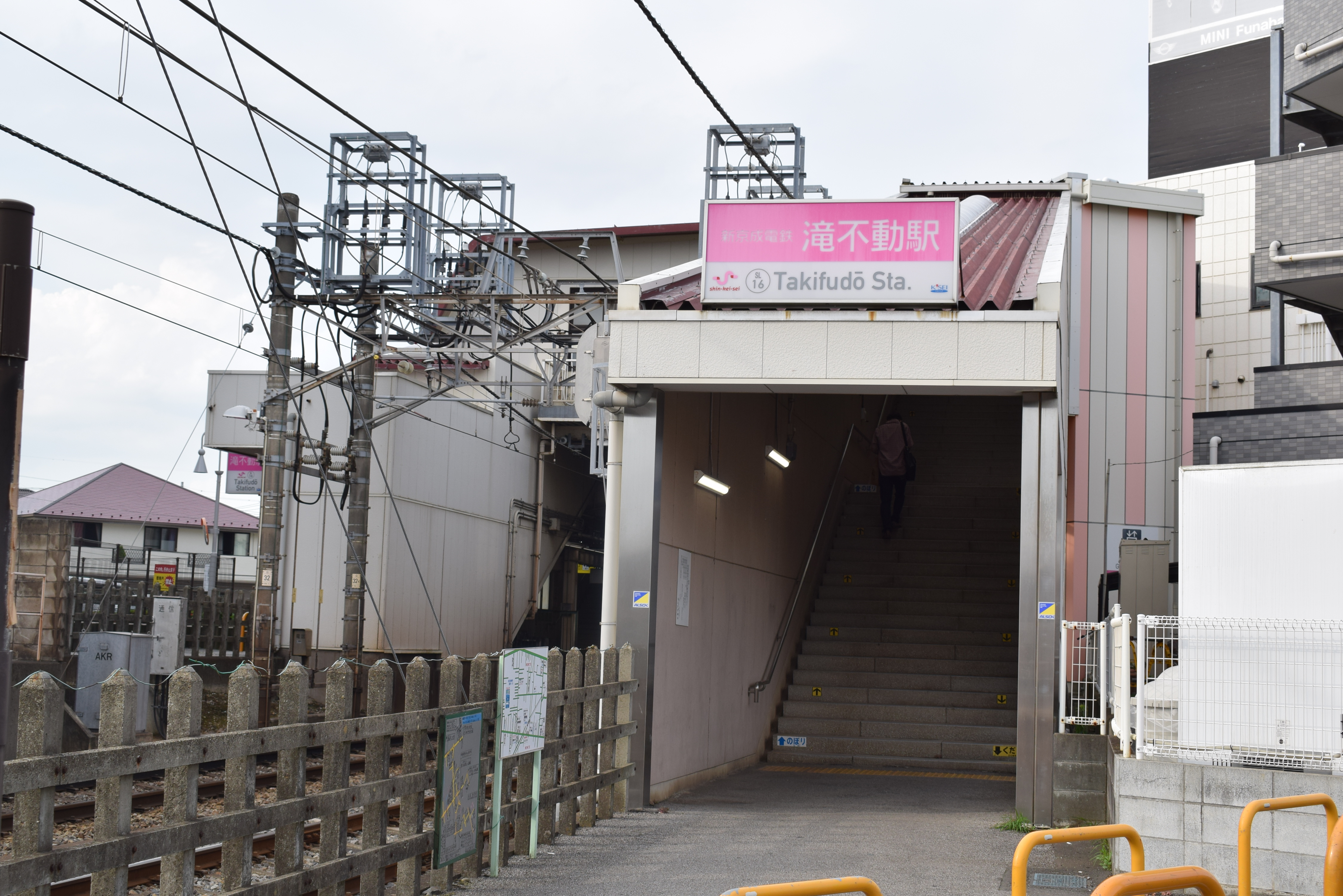 滝不動駅駅舎